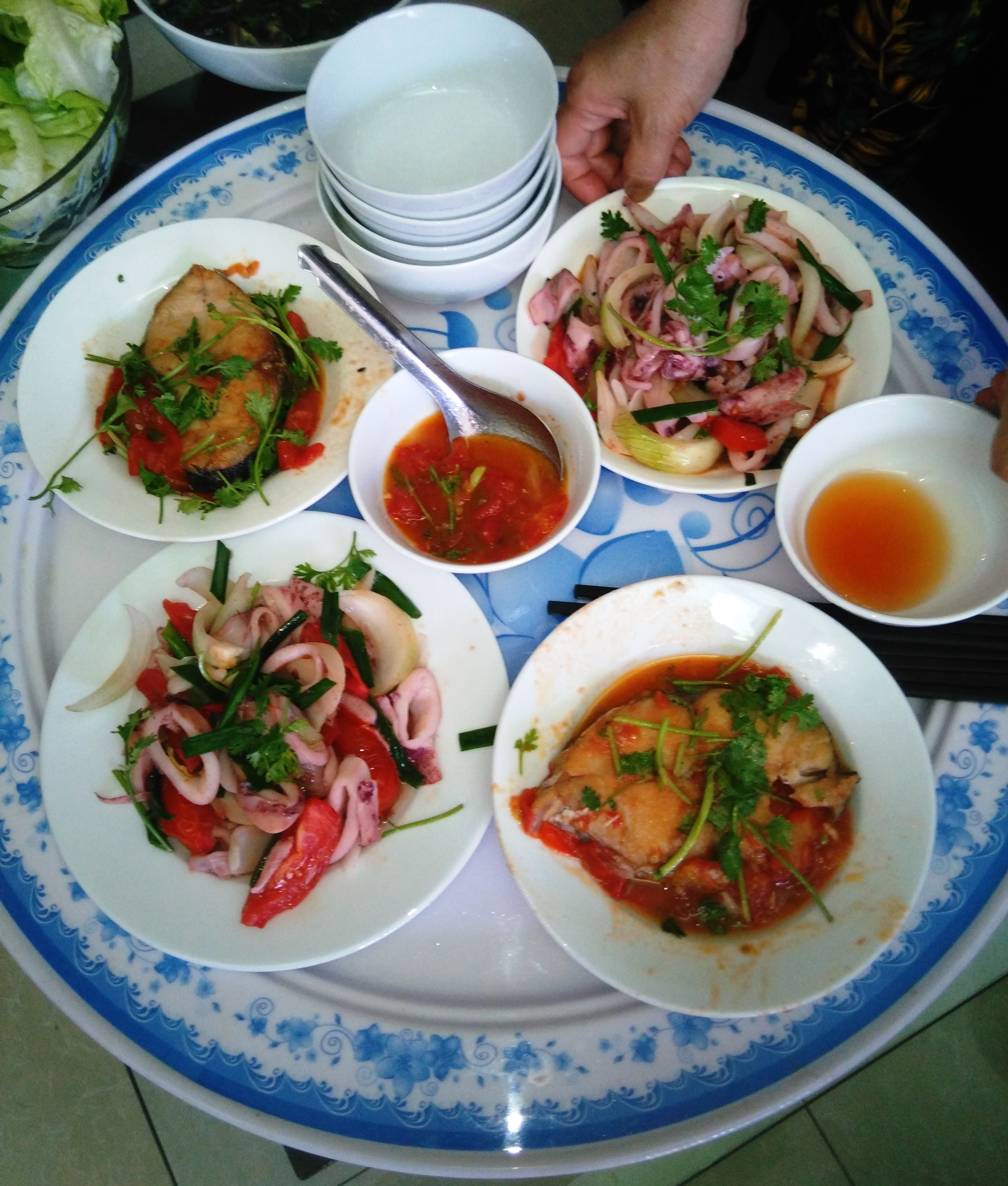 Bữa cơm gia đình, tháng 4 năm 2018